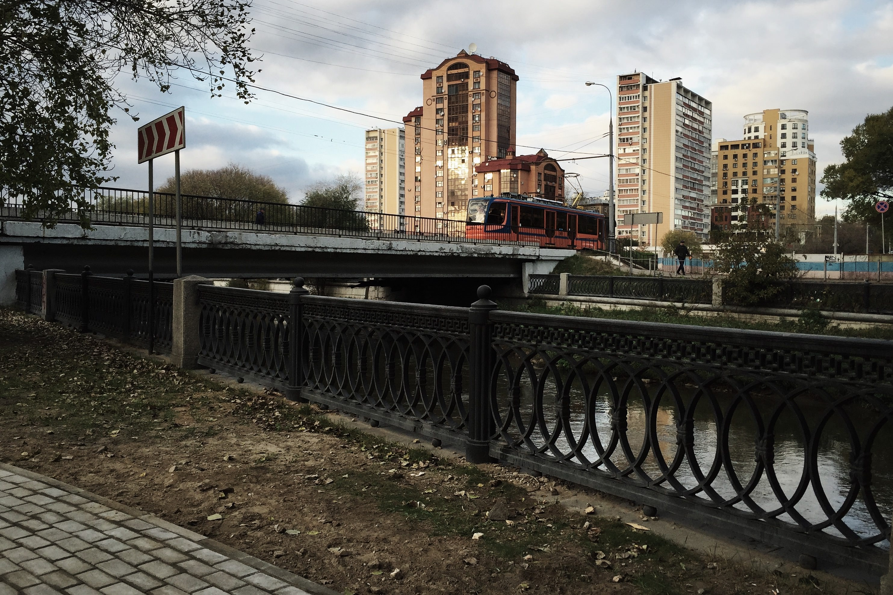 1-й Ростокинский мост (травмайно-пешеходно-теплотрассный). Построен в 1980 на месте старого Ростокинского моста. Вид с безымянной набережной по правому берегу Яузы (на северо-восток, за город)